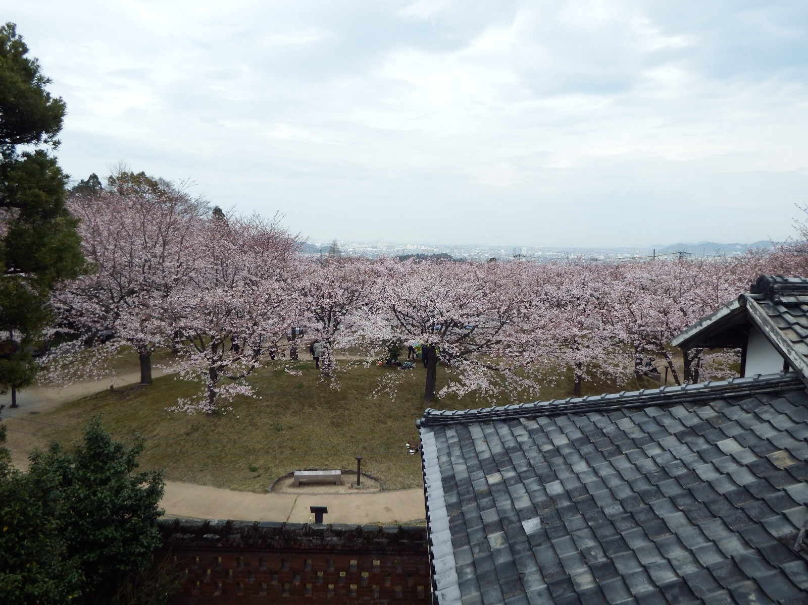 旧広瀬邸の二階より